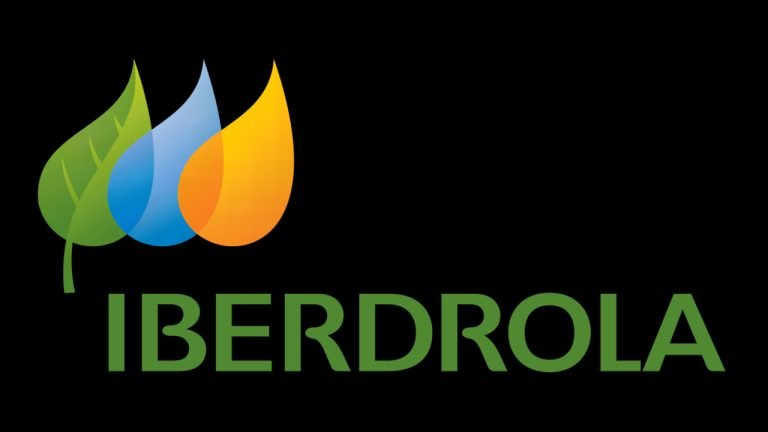 Iberdrolaren logoa